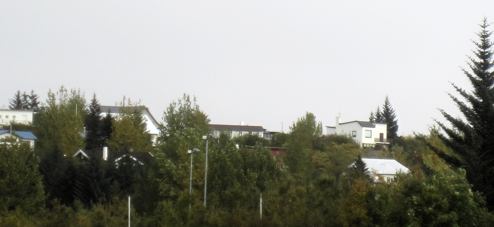 Laugardalur (trees, houses)